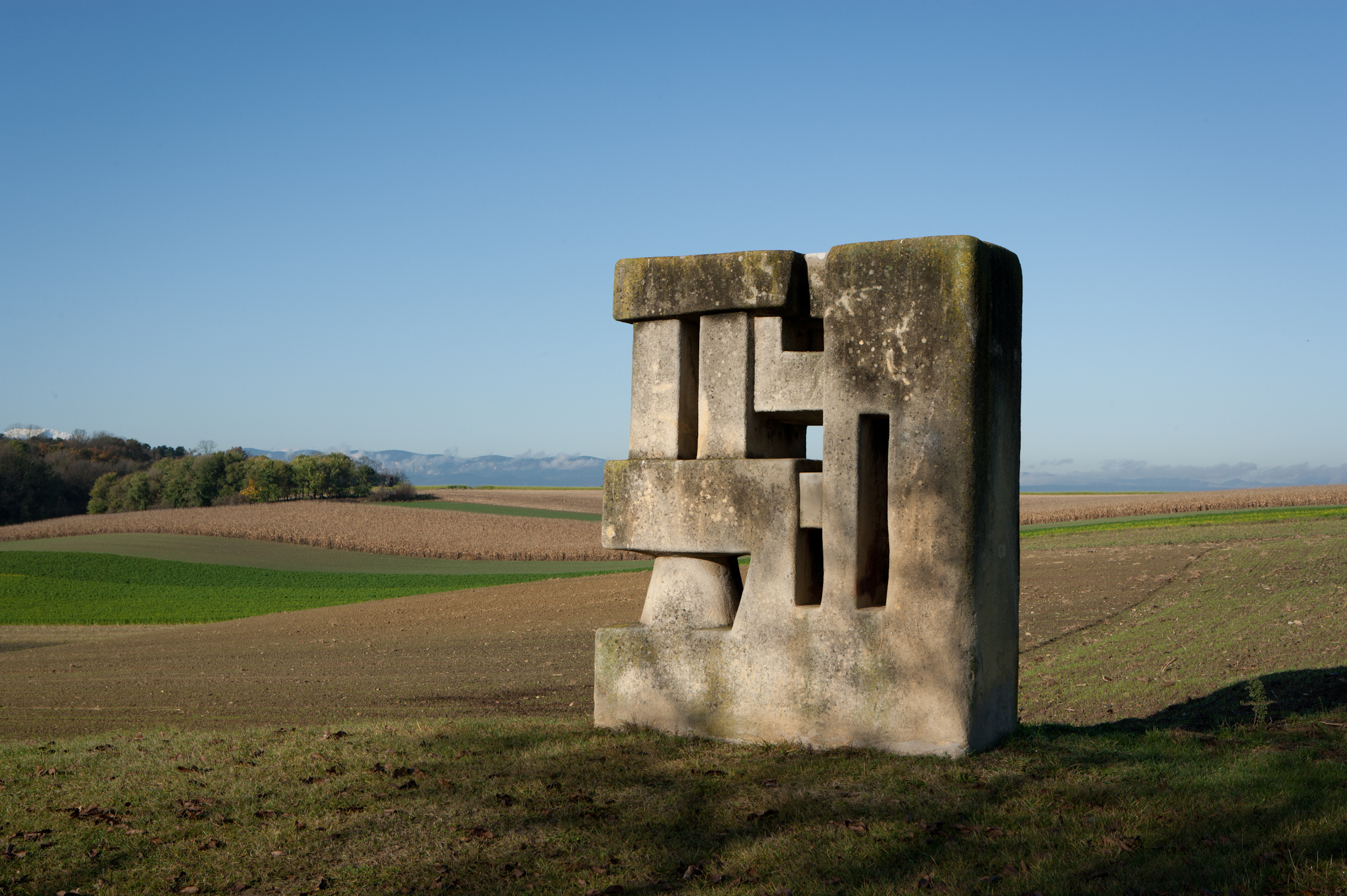 Grenzstein von Karl Prantl 1958. Er befindet sich in Pötsching-Mitterberg ehemalige k.u.k-Grenze Österreich-Ungarn.